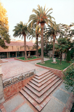 Pati de Cal Figarot, local social dels Castellers de Vilafranca (obra d'August Font i Carreras)